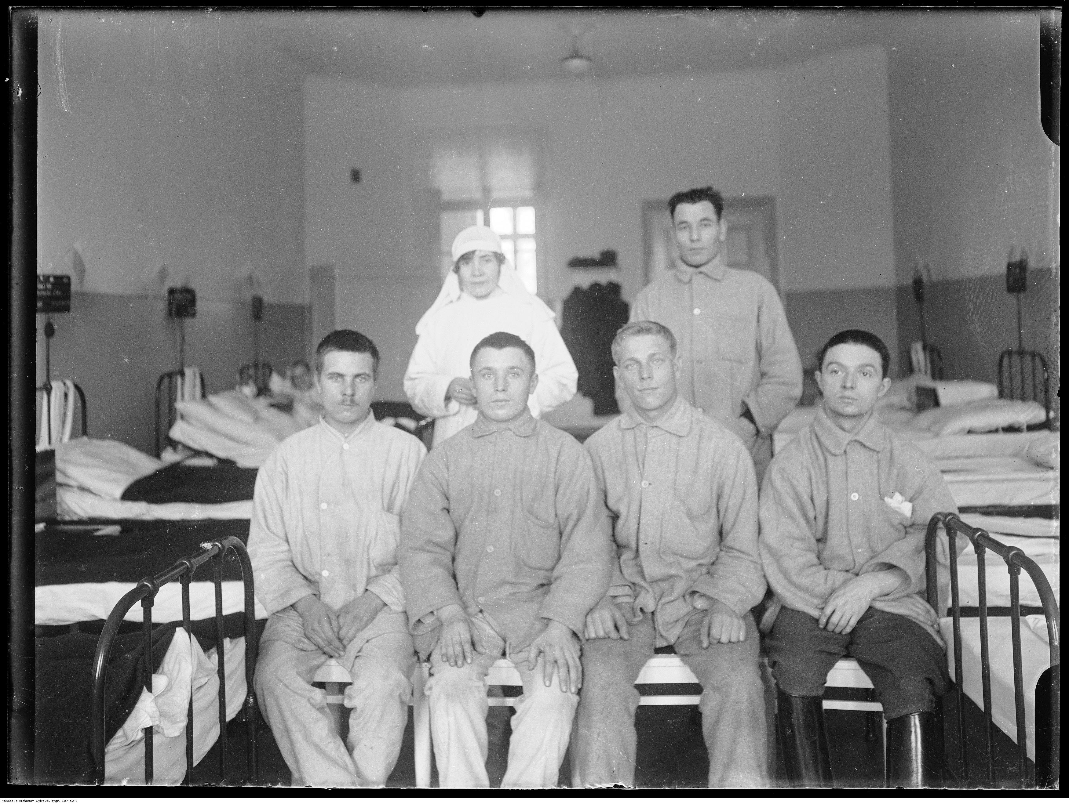 Grupa pacjentów szpitala z pielęgniarką.